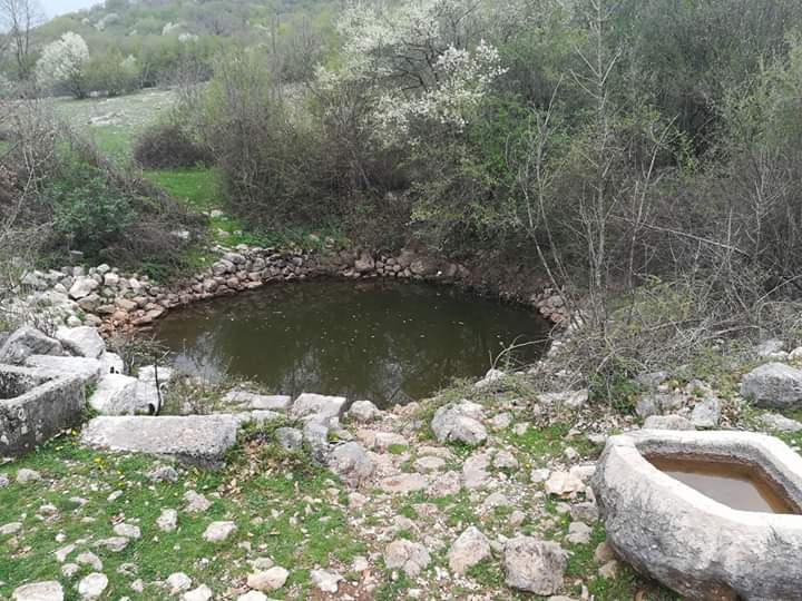 Srpski (latinica): Lokva Mosura (Bančići).